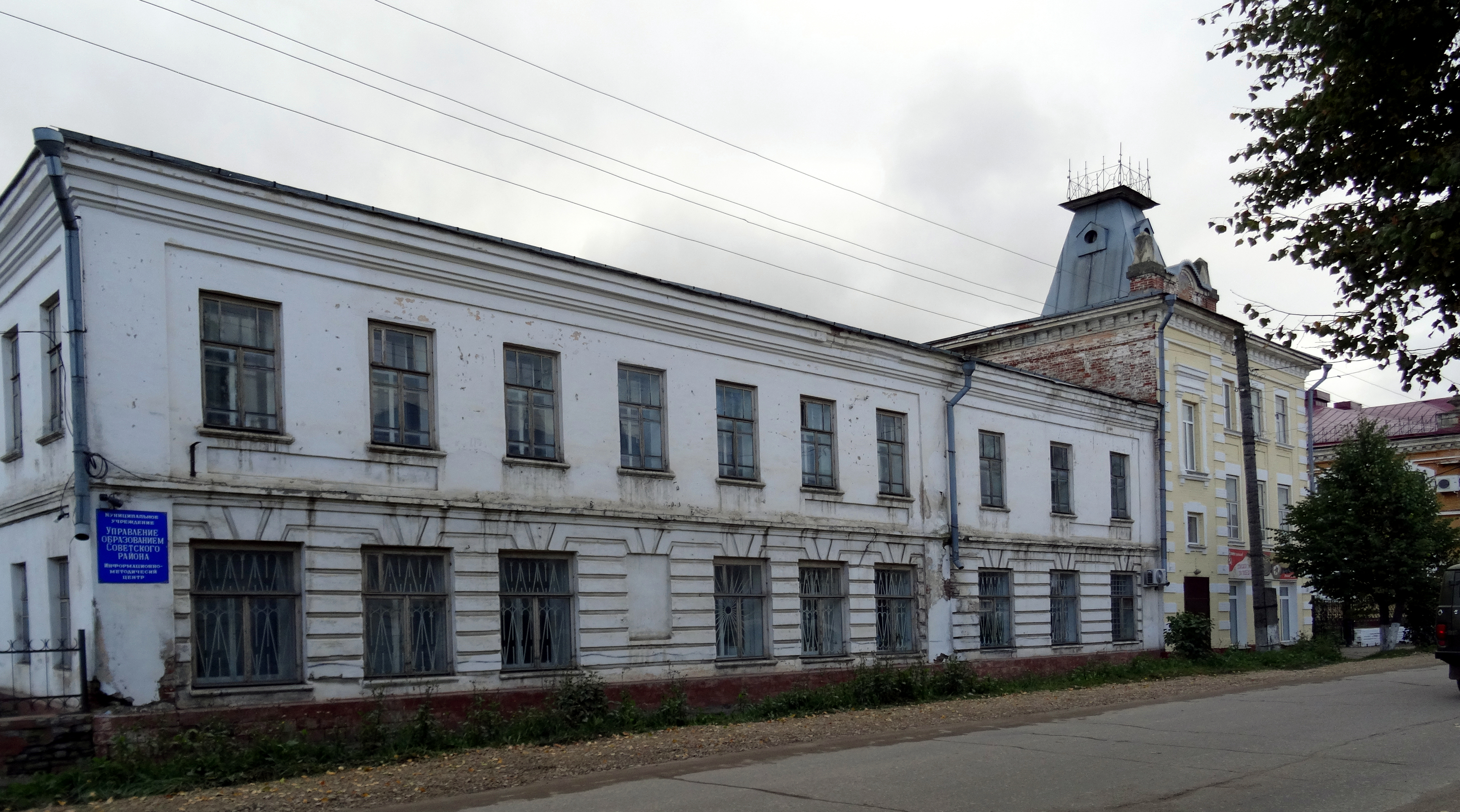 Здание, где работал первый исполком совета рабочих, крестьянских и солдатских депутатов. Здесь была создана комсомольская организация слободы Кухарки: улица Ленина, 20, Советск, Советский район, Кировская область